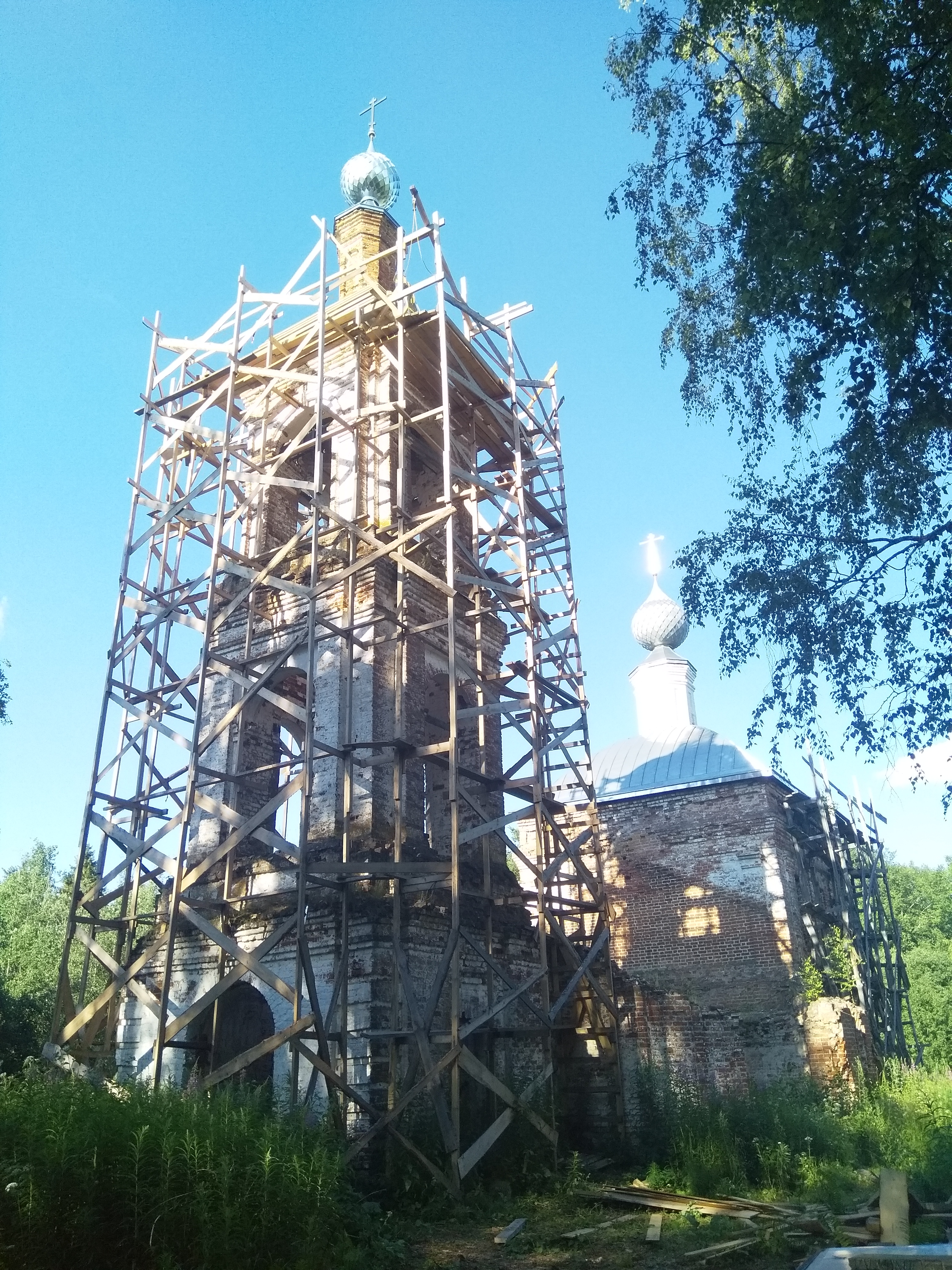 Храм Николая Чудотворца, 1822 год, урочище Никола-Эз, Кинешемский район (Краткие статистические сведения о приходских церквах Костромской епархии. Кострома : Губернская типография, 1911).